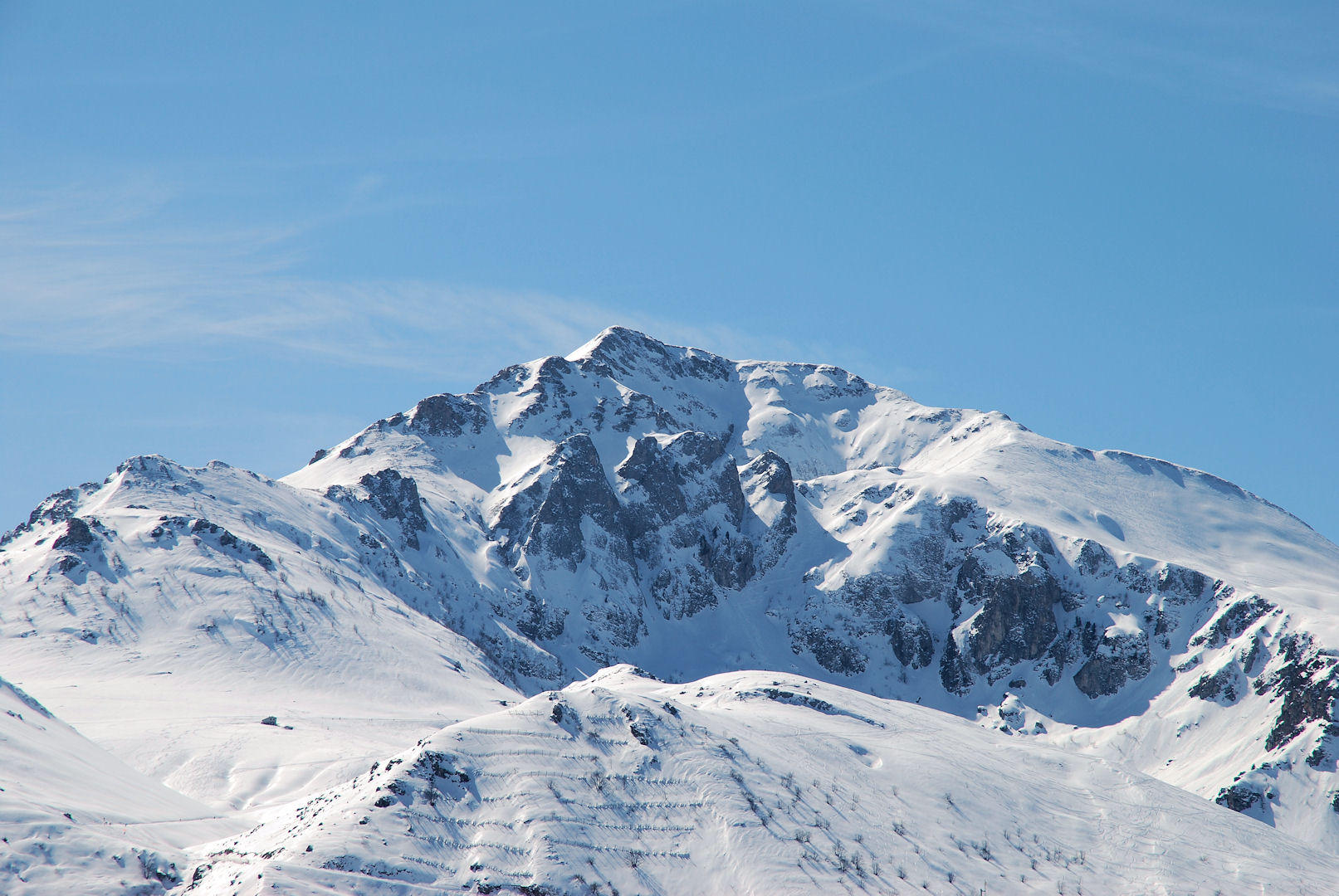 Il Mondolè nel mese di marzo, visto dal Hotel Galassia